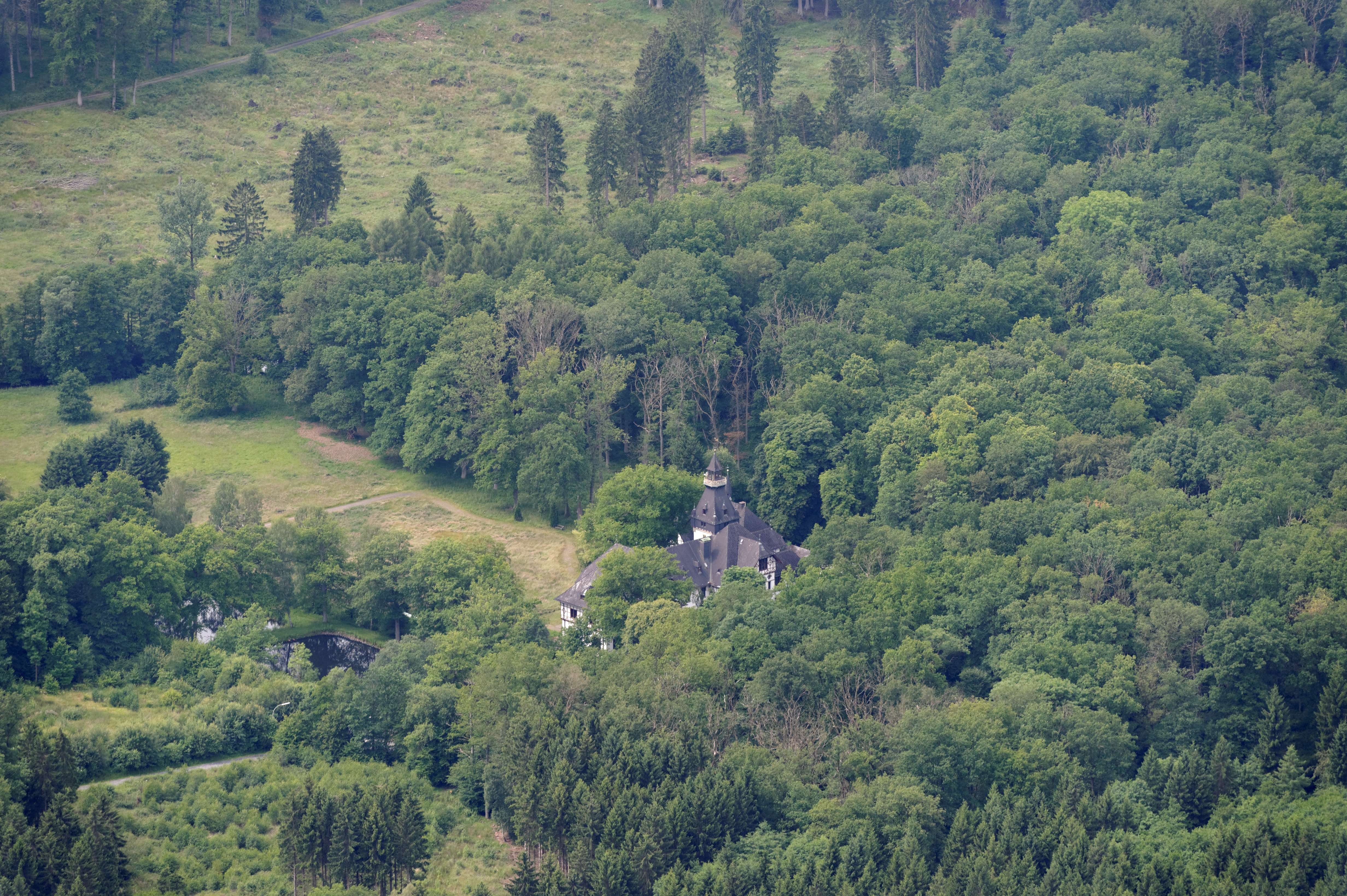 Gemeinde Möhnesee: Jagdschloss St. Meinolf, Fotoflug Sauerland-Nord